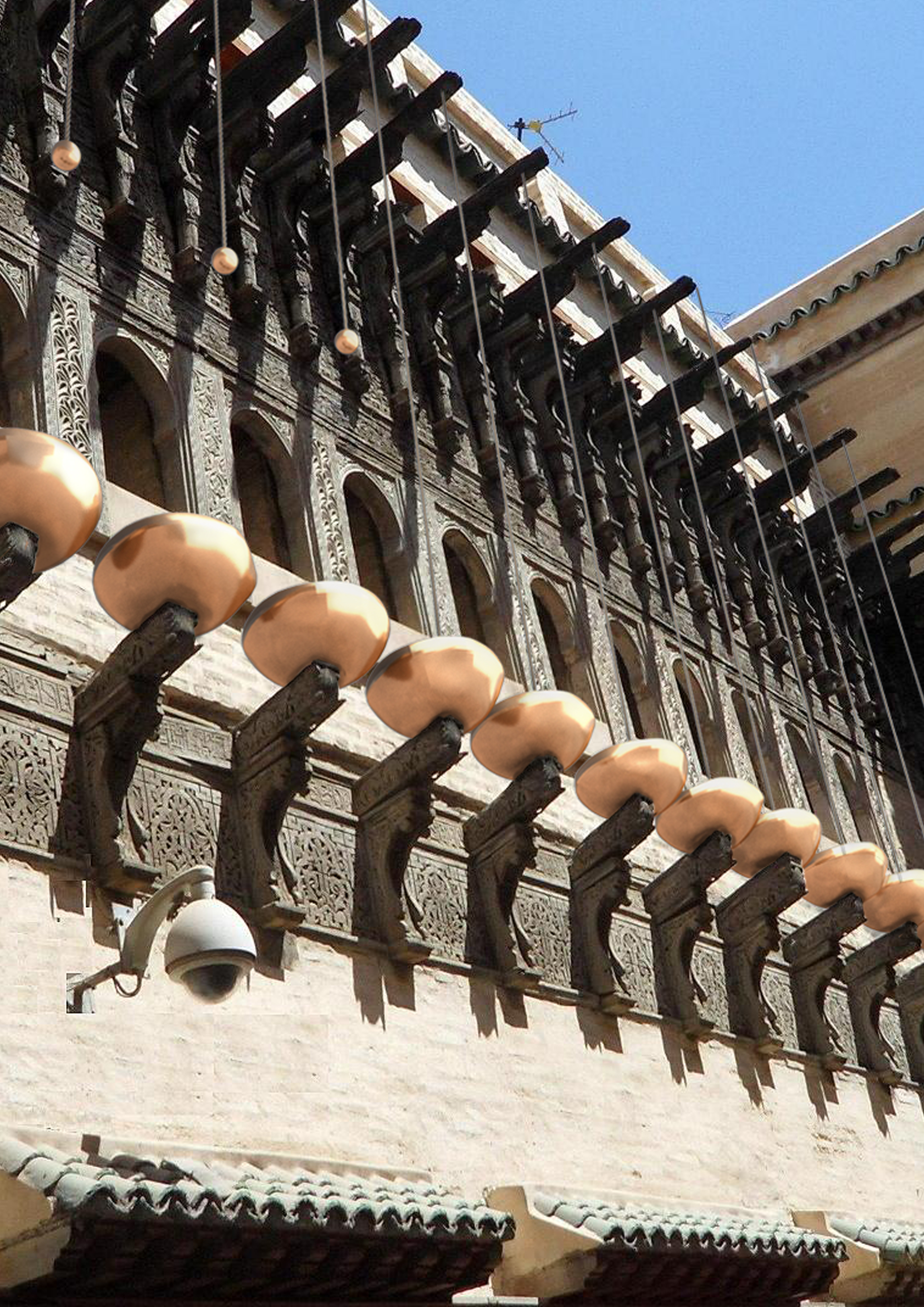 Façade de La Magana de Fès reconstituée